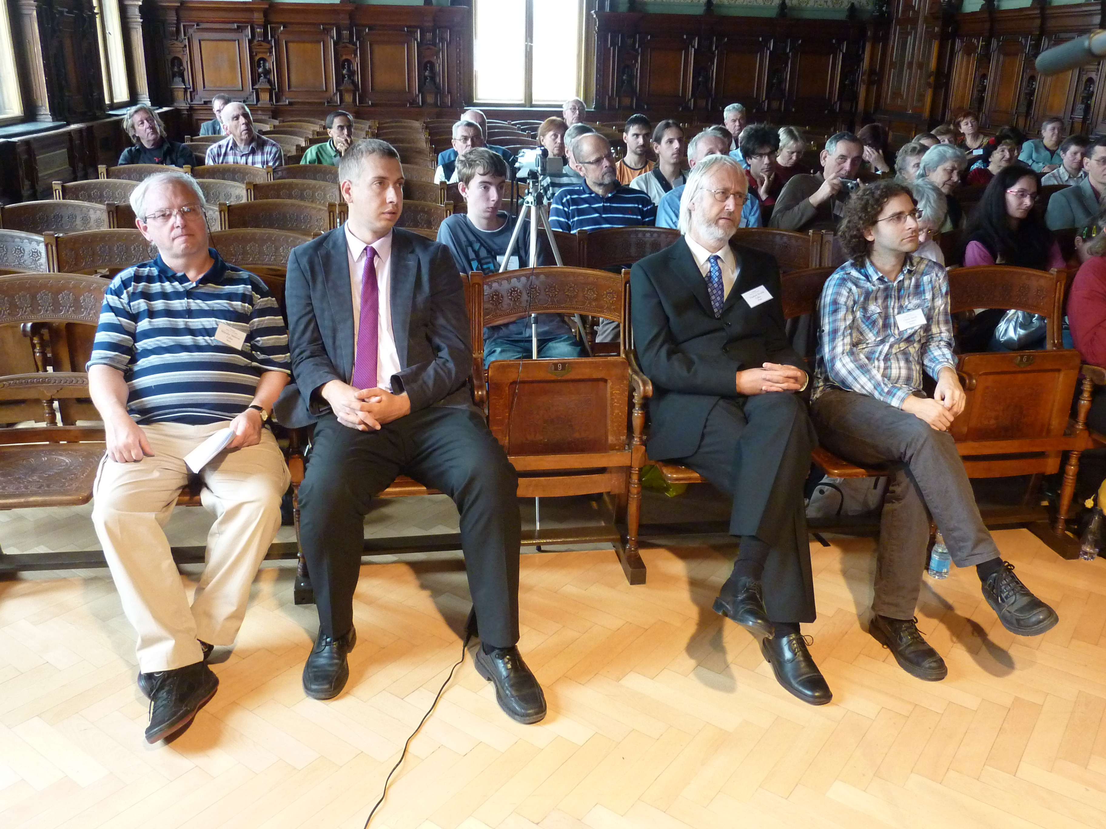 Unua vico en la salono dum solenaĵo dum Esperanta Vikimanio 2011 en Svitavy.